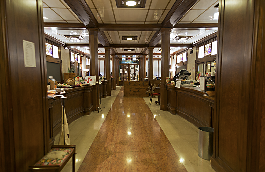 Attuale interno dell'ex Albergo diurno Cobianchi This is a photo of a monument which is part of cultural heritage of Italy.